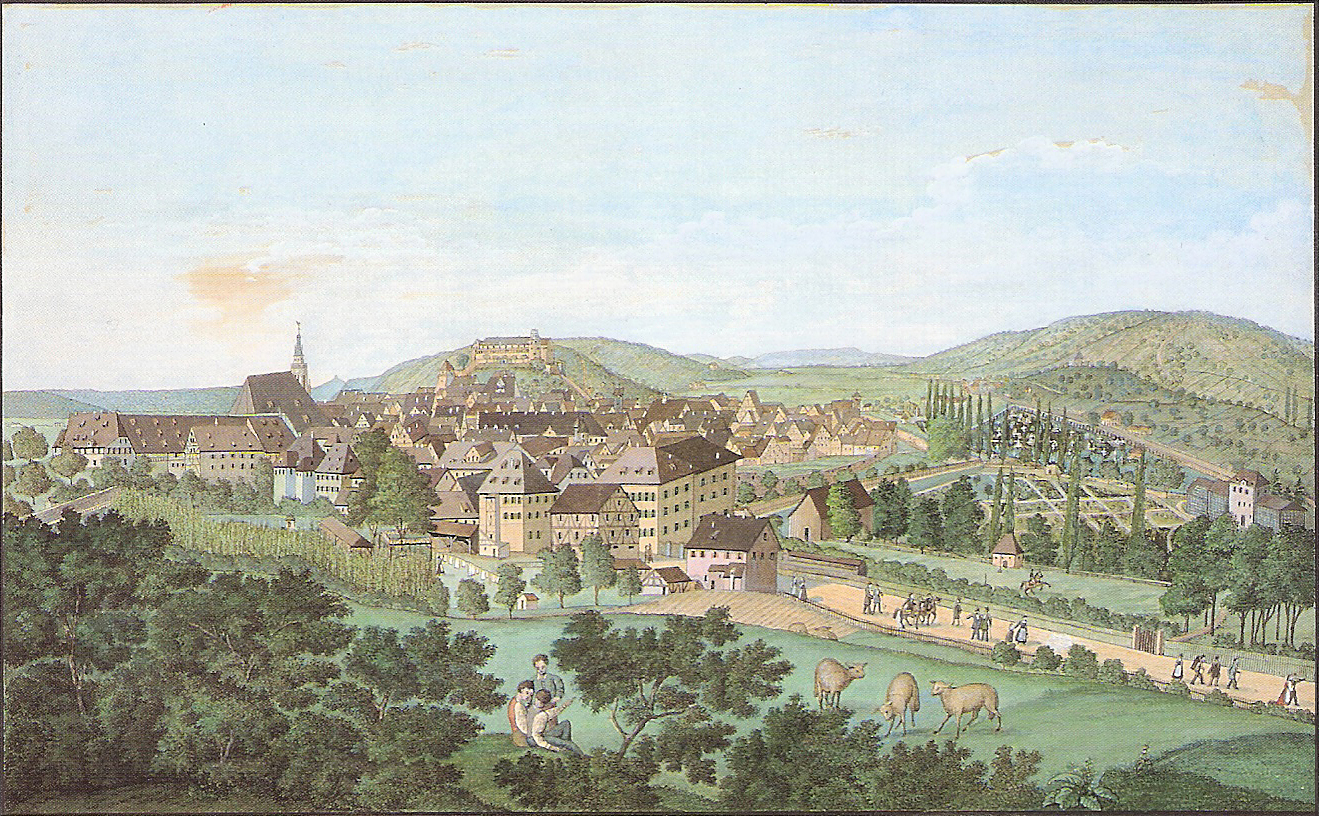 Tübingen [vom nördlichen Österberg] 1828 (Gouache 26,5 x 42 cm, Blatt 37,2 x 53,5 cm); Schefold 9323